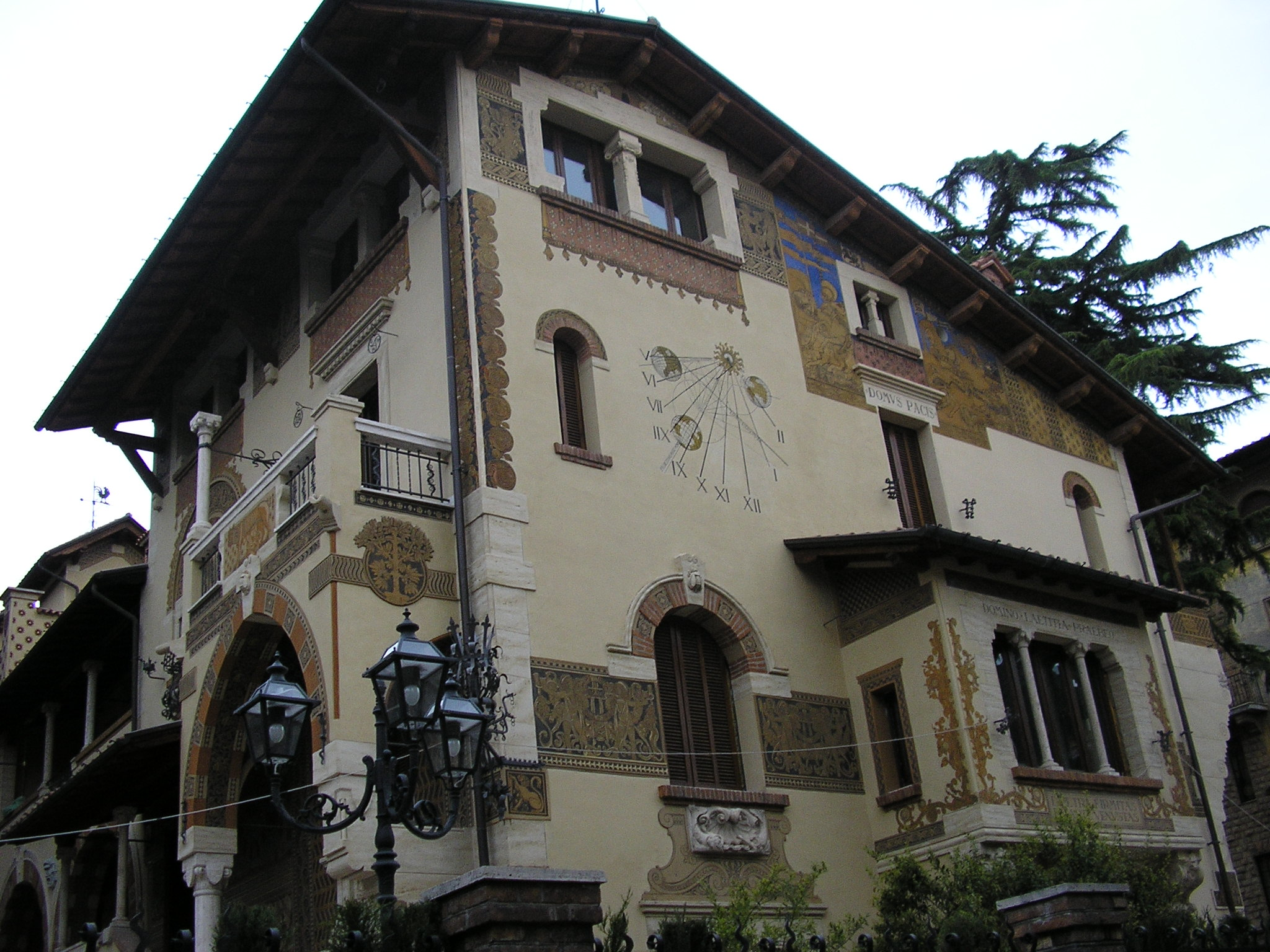 A building by Gino Coppedè in the area near via Dora in Rome, also known as "quartiere Coppedè". Picture by: The Doc.